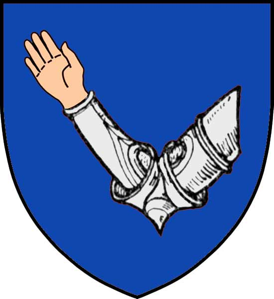 Vapensköld för finländska och svenska frälseätten Tavast